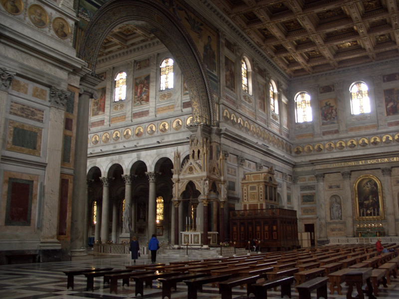 San Paolo, Roma, Italia